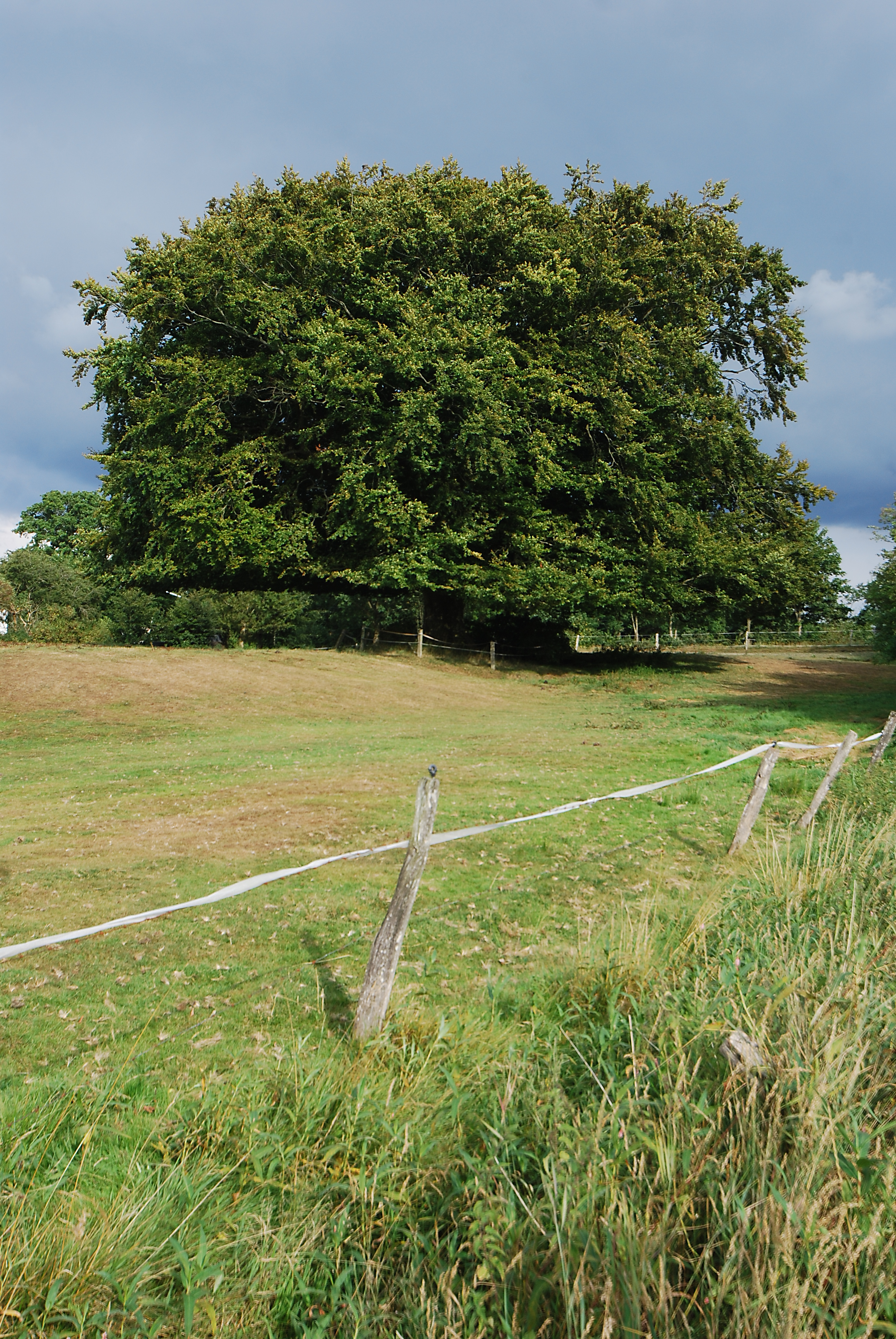 Naturdenkmal Buche im Kreis Schleswig-Flensburg in Gottrupel (zu Handewitt) an der Straße Meynautal